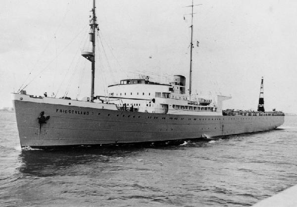 Das Katapultschiff FRIESENLAND der DLH